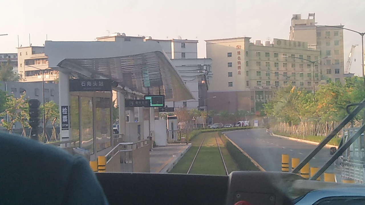 深圳有轨电车石角头站，位于龙华区